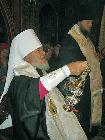 Макарій, митрополит Вінницький та Могилів-Подільський